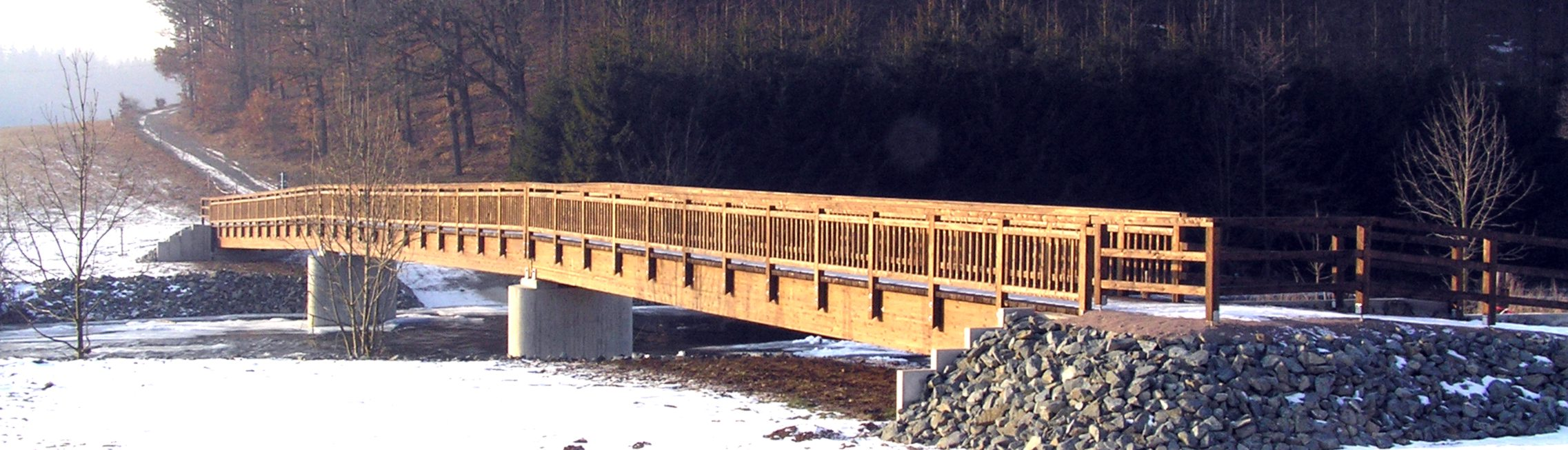 Bretmühle-Brücke über die Weiße Elster